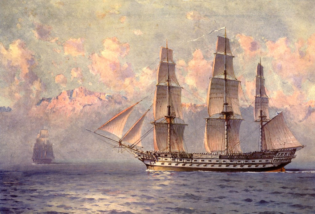 Линейный корабль «Императрица Мария» под парусами. Альбом «Российский императорский флот». Петроград. 1916 год.